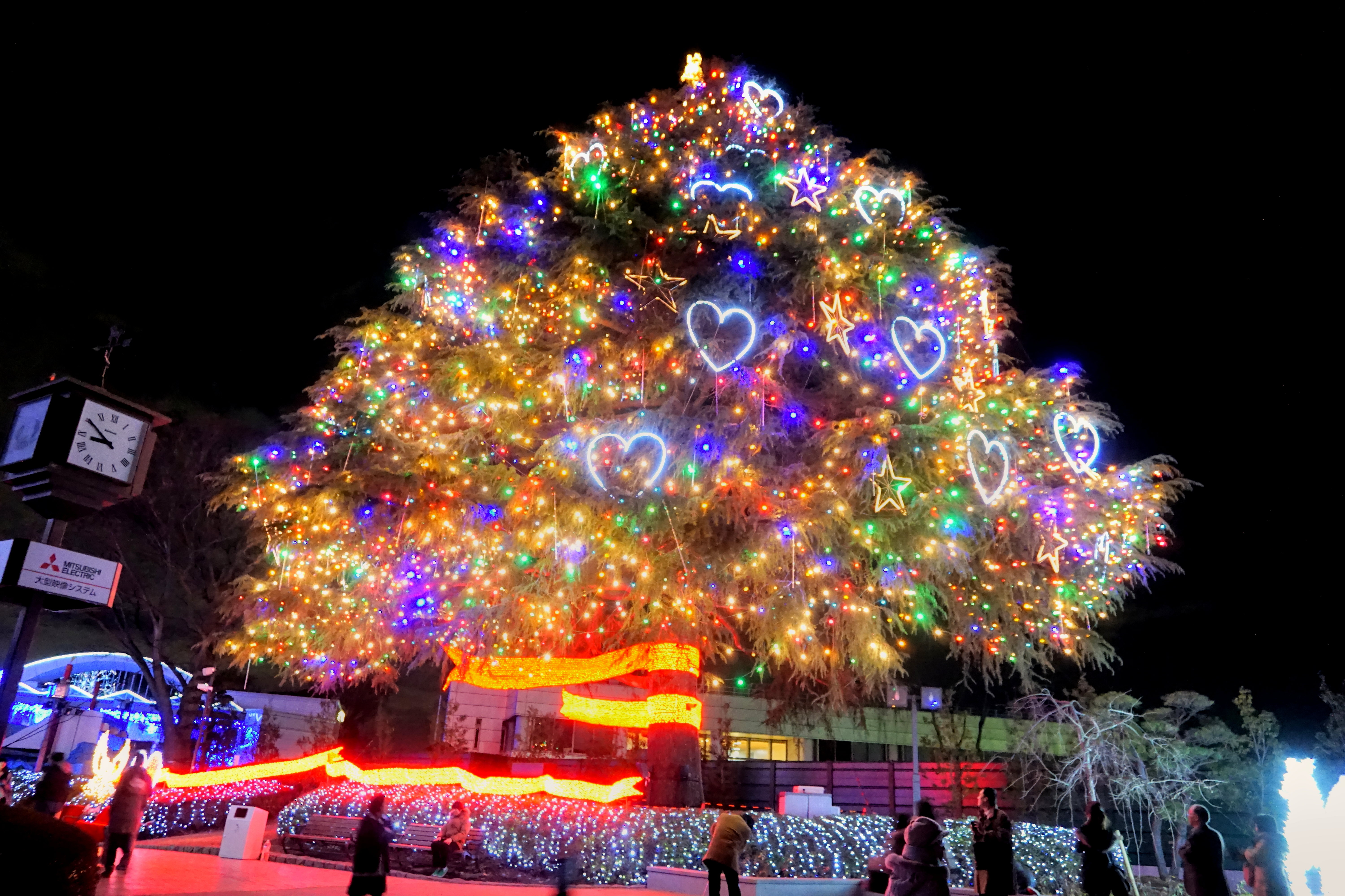 中山競馬場クリスマスイルミネーション